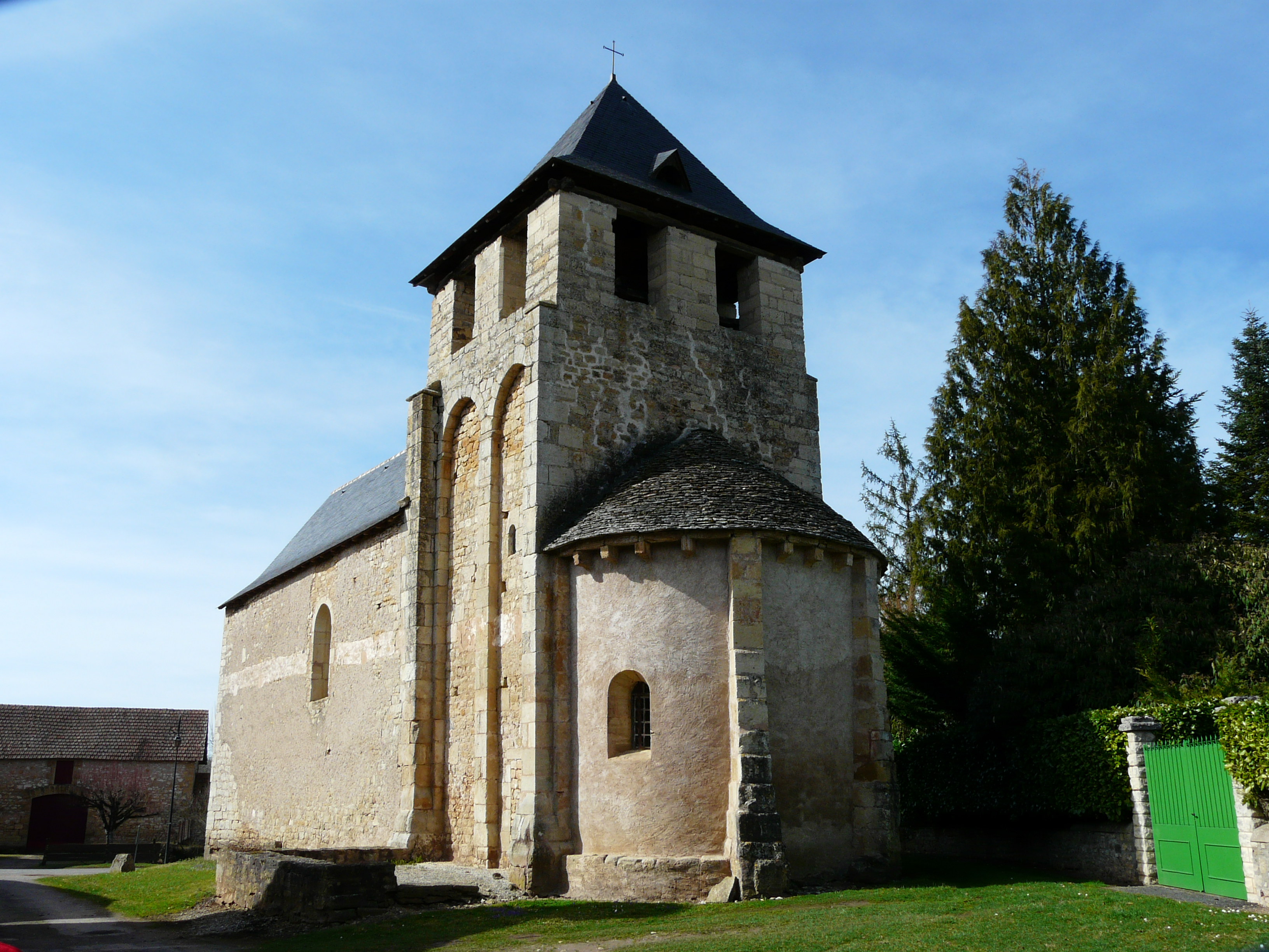 Le chevet de l'église Saint-Martial-Laborie, Cherveix-Cubas, Dordogne Object location45° 16′ 51.6″ N, 1° 06′ 23.1″ E